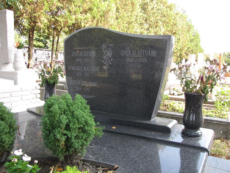 Gyulai István (Budapest, 1943. március 21. – Monte Carlo, 2006. március 12.) sportriporter, a Nemzetközi Amatőr Atlétikai Szövetség (IAAF) főtitkára sírja Budapesten. Pestszenterzsébeti temető: 38-X-1-1/.